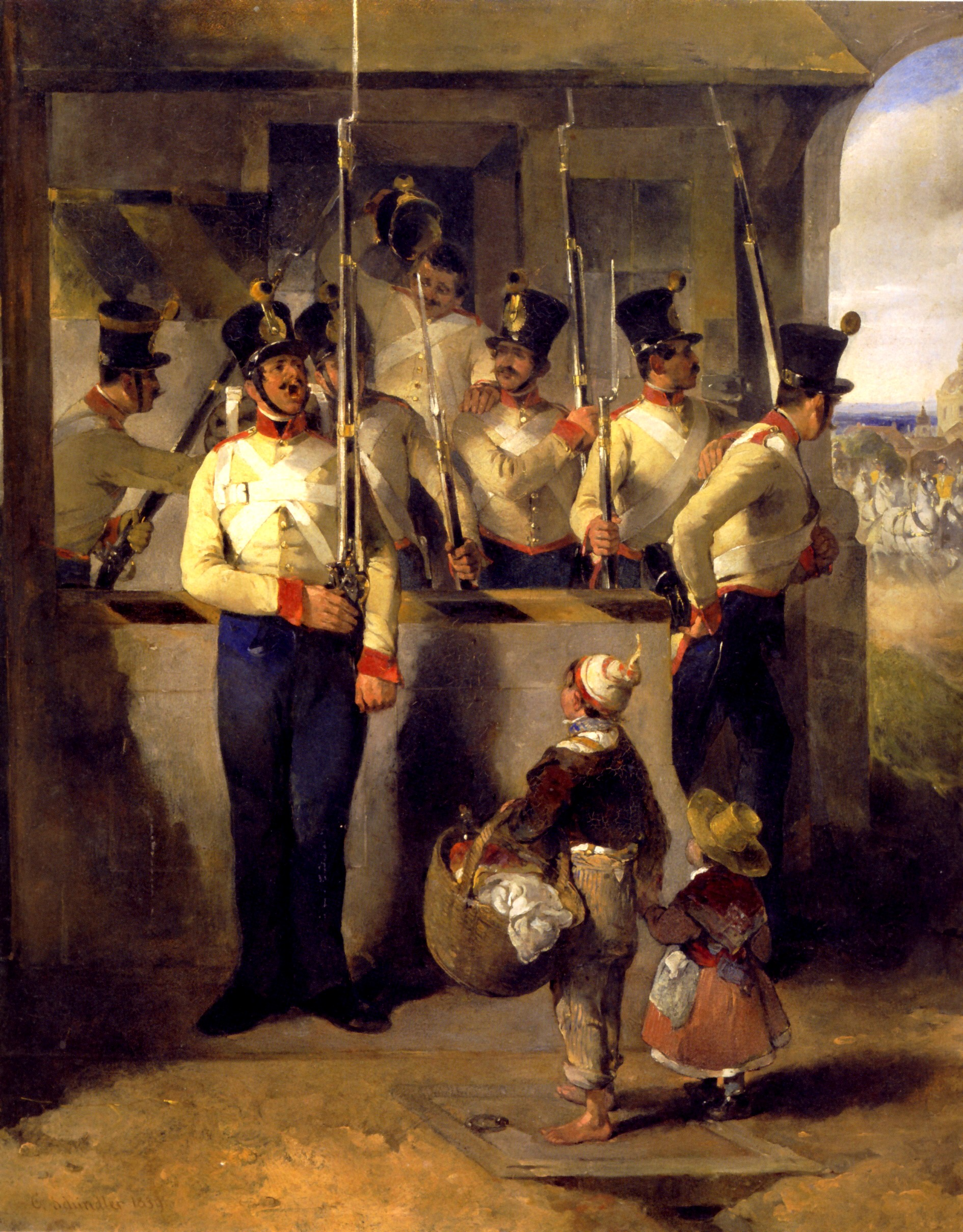 Die Schildwache, in das Gewehr rufendtitle QS:P1476,de:"Die Schildwache, in das Gewehr rufend" label QS:Lde,"Die Schildwache, in das Gewehr rufend"